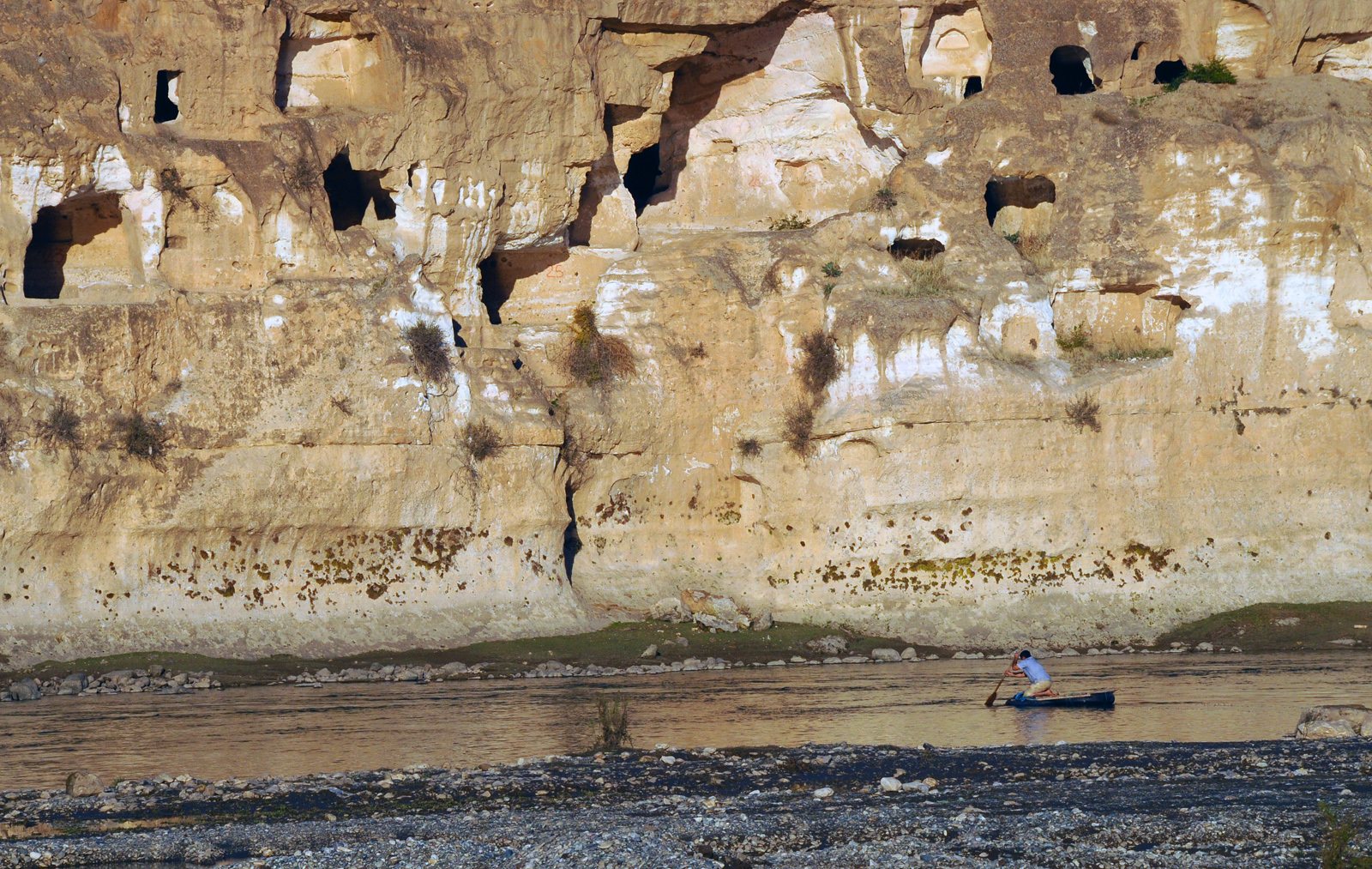 Kurdî: Heskîf